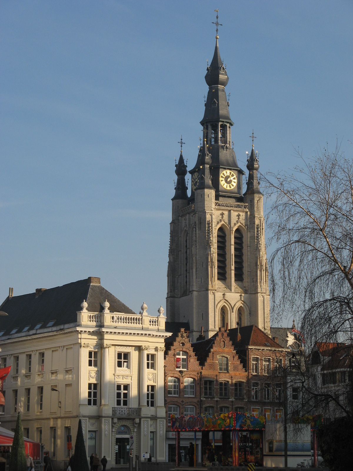 Kortrijk